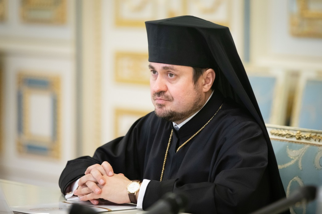 Єпископ Едмонтонський Іларіон (Рудник)